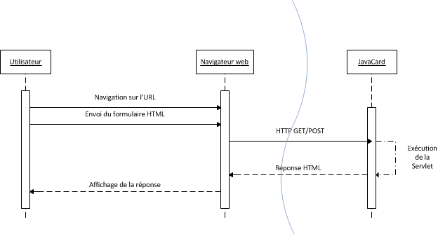 Diagramme mode connecte JavaCard